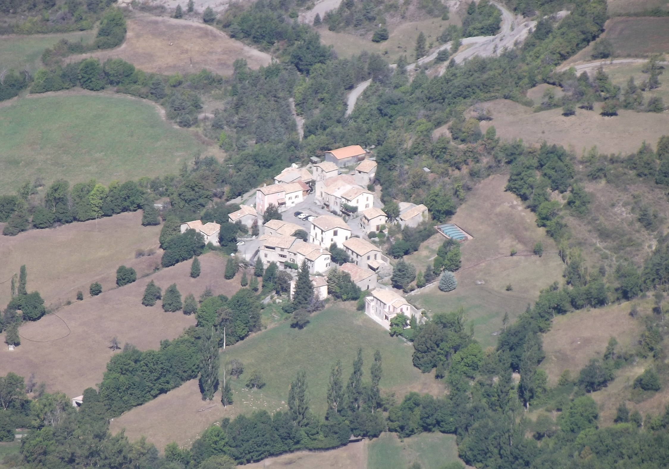 Archail vu du pic de Couard